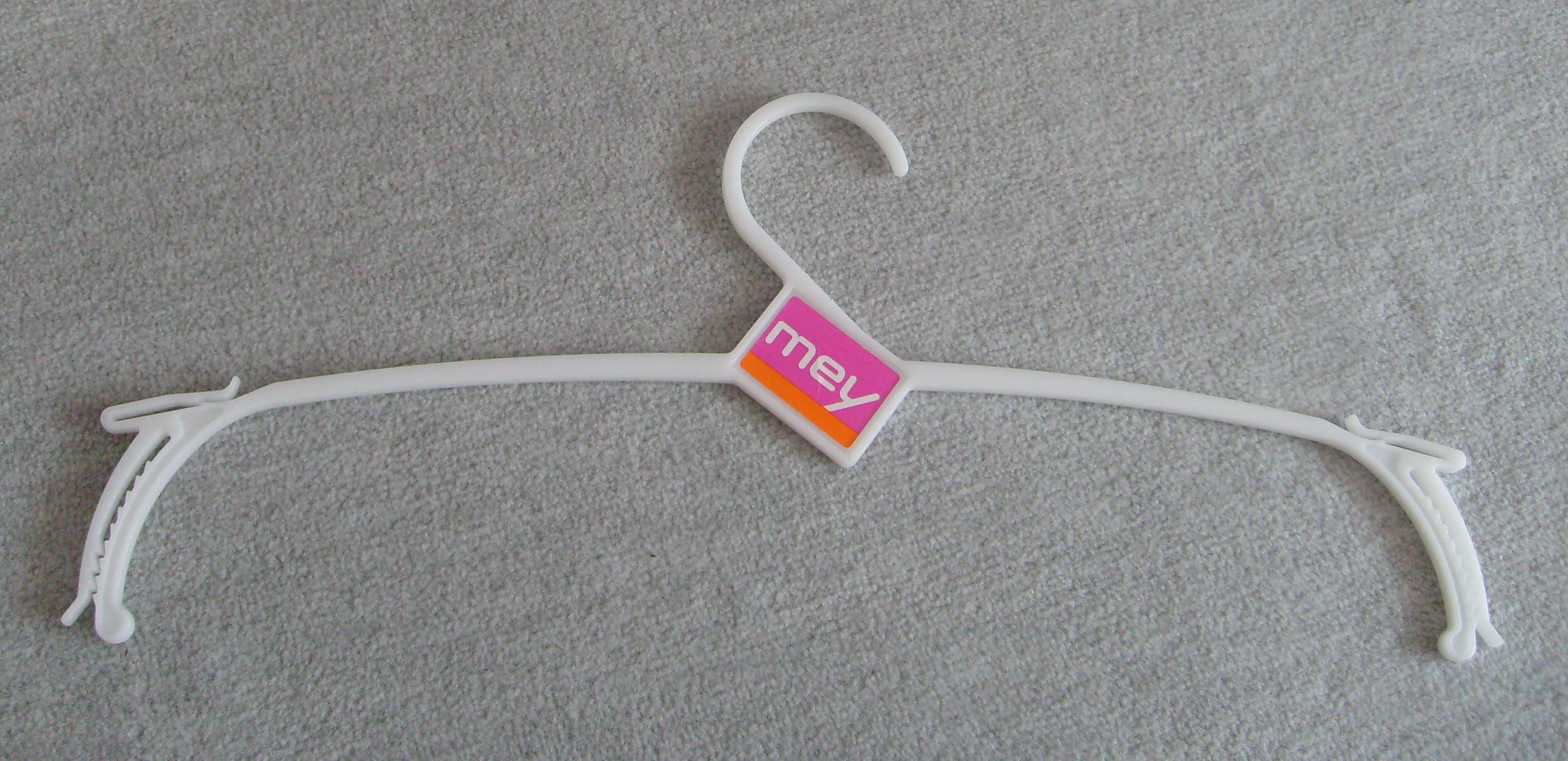 Der sogenannte „Schwäbische Bumerang“, ein Wäschebügel entwickelt von Mey und den Fischerwerken. Das ökologisch ausgerichtete Bügel-Kreislauf-System erhielt 1998 den Umweltpreis „Ökoprodukt des Jahres“.